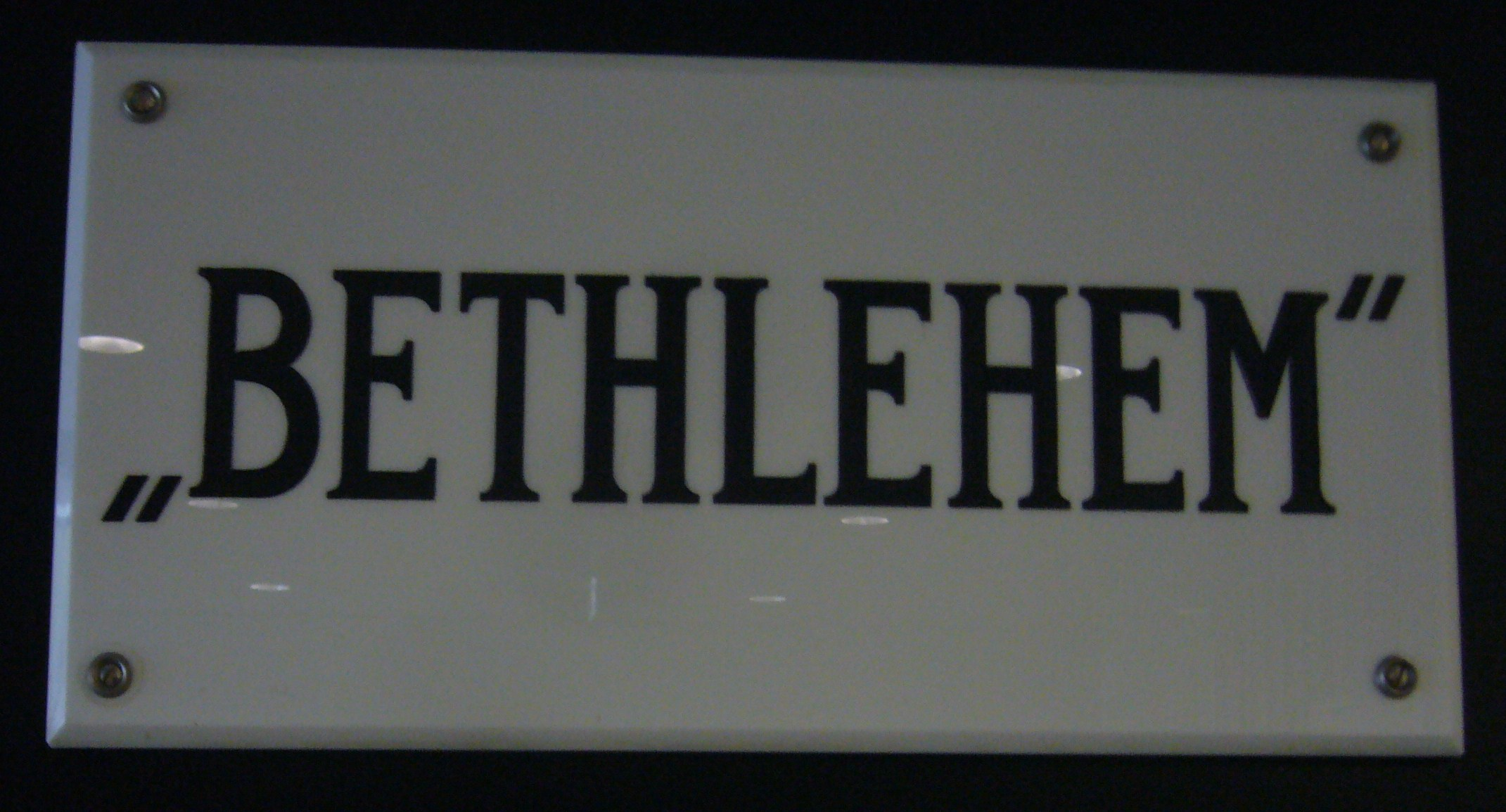 Naambord van de voormalige Bethlehem Kliniek in Den Haag